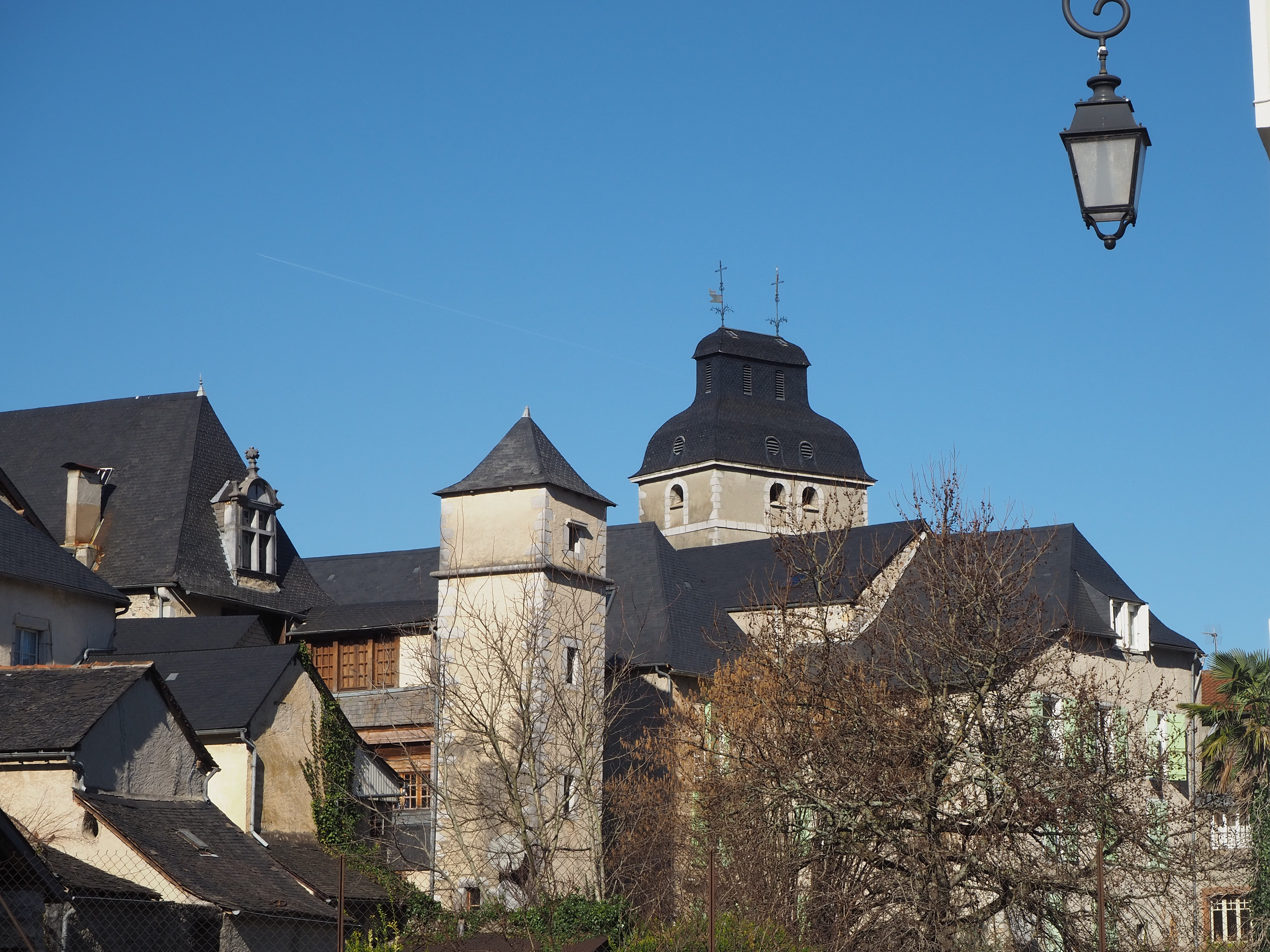 Arudy.